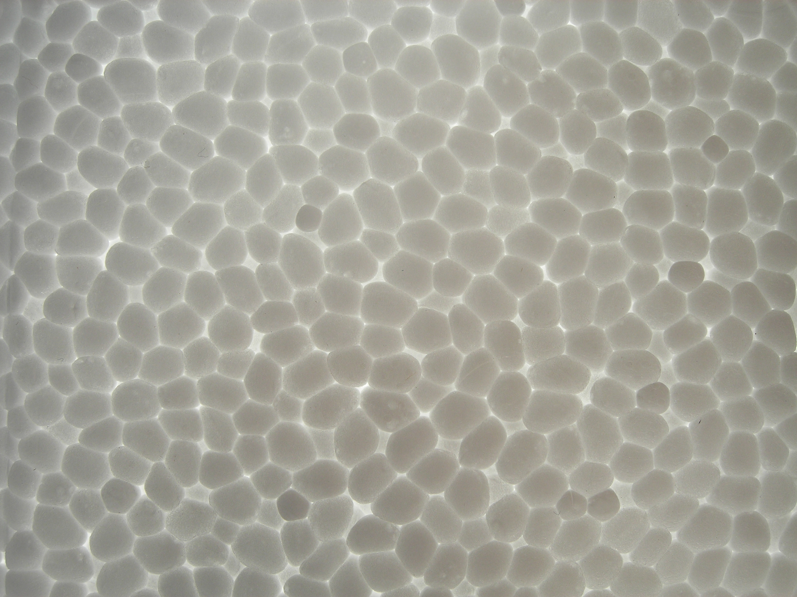 Una lastra di polistirolo espanso spessa circa 1 cm attraversata dalla luce solare.